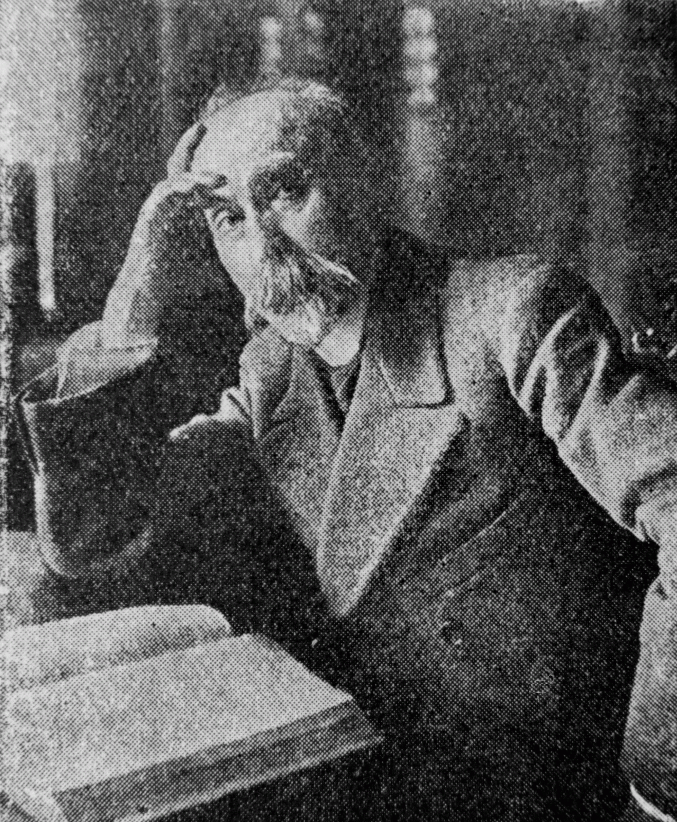 Georgij Valentinovič Plechanov (* 11. prosince 1857 (gregor. kalendář), Tambov, Rusko – 30. května 1918, Terijoki, Finsko) byl ruský politik, marxistický filozof a menševik. Foto před rokem 1919.